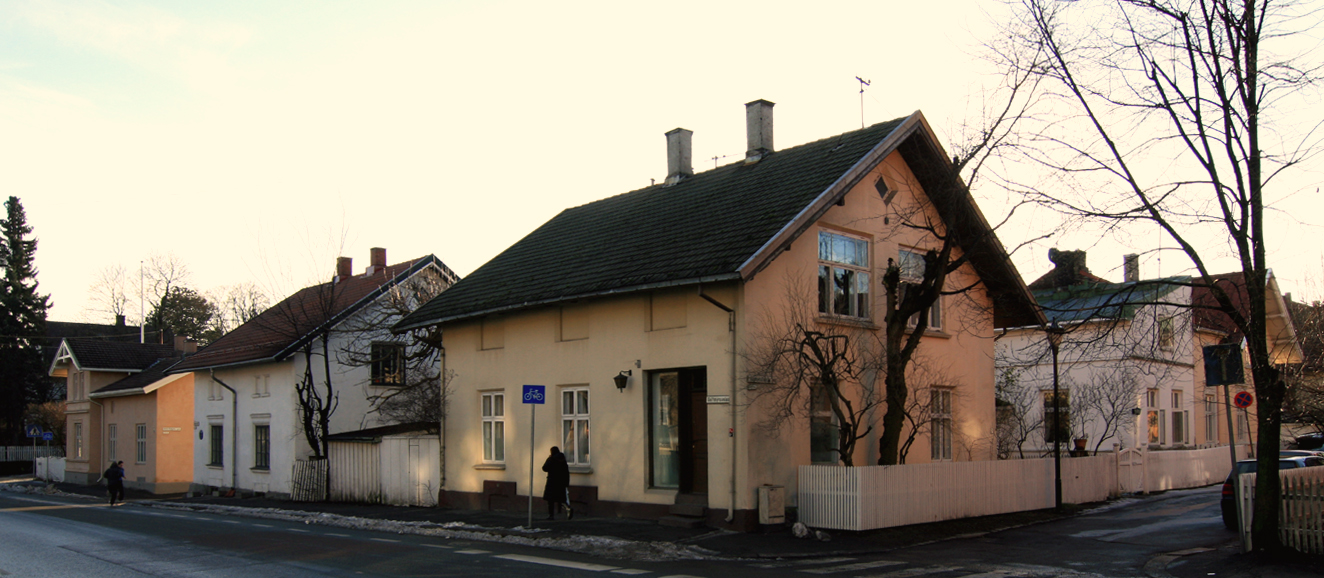 Frølichbyen, Geitmyrsveien 44-48, Oslo. Bygd 1870-1872; arkitekt Georg Bull.